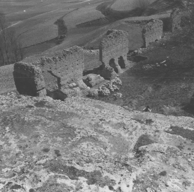 Ruinas, restos de muralla - Clunia (Burgos) - Fotografía B/N